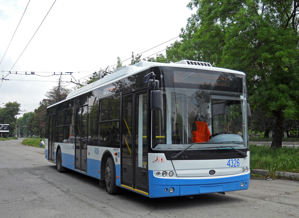 Троллейбус "Богдан Т701.10" №4326 маршрута "5/7" на конечной остановке в микрорайоне "Новоромановка" (Симферополь)